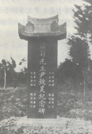 아산 음봉면 음봉보통학교 부지 제공 기념, 윤치호 기념비